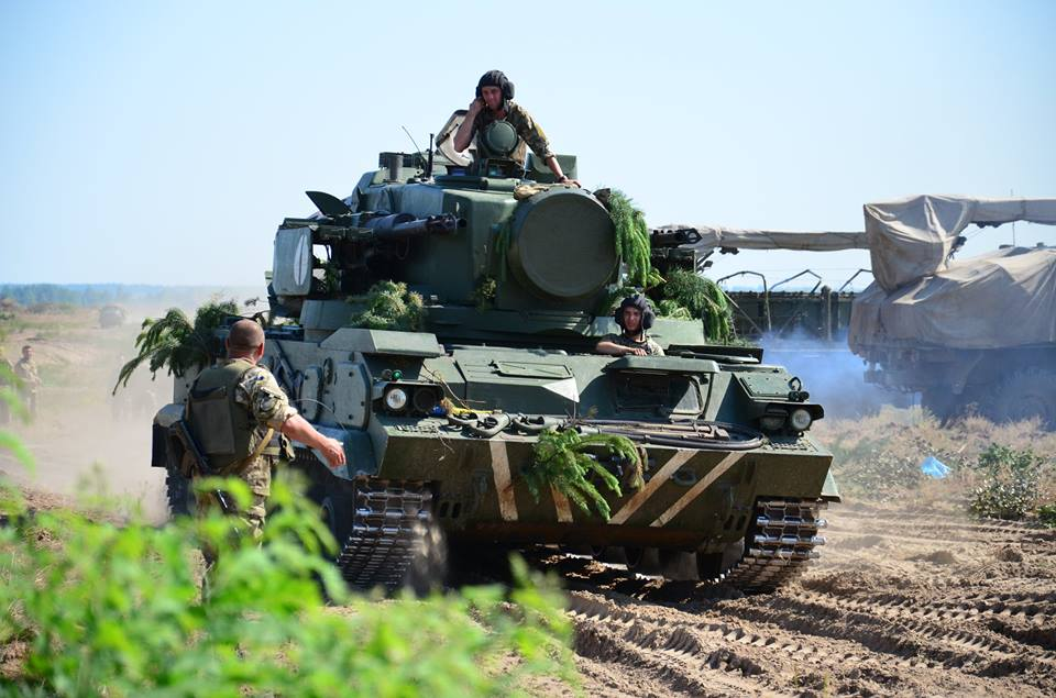 На військовому полігоні 1-ї окремої гвардійської танкової бригади (смт Гончарівське Чернігівської області) тривають десятиденні навчальні збори резервістів. Начальник Генерального штабу — Головнокомандувач Збройних Сил України генерал армії України Віктор Муженко перевірив хід проведення зборів з резервістами. Серед військовозобов’язаних є чимало бійців, які проходили військову службу в складі 1-ї окремої гвардійської танкової бригади у різні хвилі мобілізації, є учасниками АТО. Згідно плану зборів, навчання для військовослужбовців та резервістів продовжились із розроблення “плану бойових дій” бригади, прийняття рішень та доведення завдань до підрозділів. Зранку один із артилерійських дивізіонів продовжив перший навчальний етап виконанням вогневого завдання бойовими пострілами. Також для виконання практичних вправ стрільб зі стрілецької зброї, згідно плану, було задіяно військовослужбовців одного з танкових батальйонів. Підрозділи на першому етапі навчальних зборів відпрацювали елемент переміщення у вихідний район для “наступу” та знаходяться в місцях відповідно до своїх напрямків виконання завдань. Після проведення рекогносцировки, організації взаємодії, розпочалась практична робота командира в підпорядкованих підрозділах та організація контролю готовності. Фото: Роман Туровець